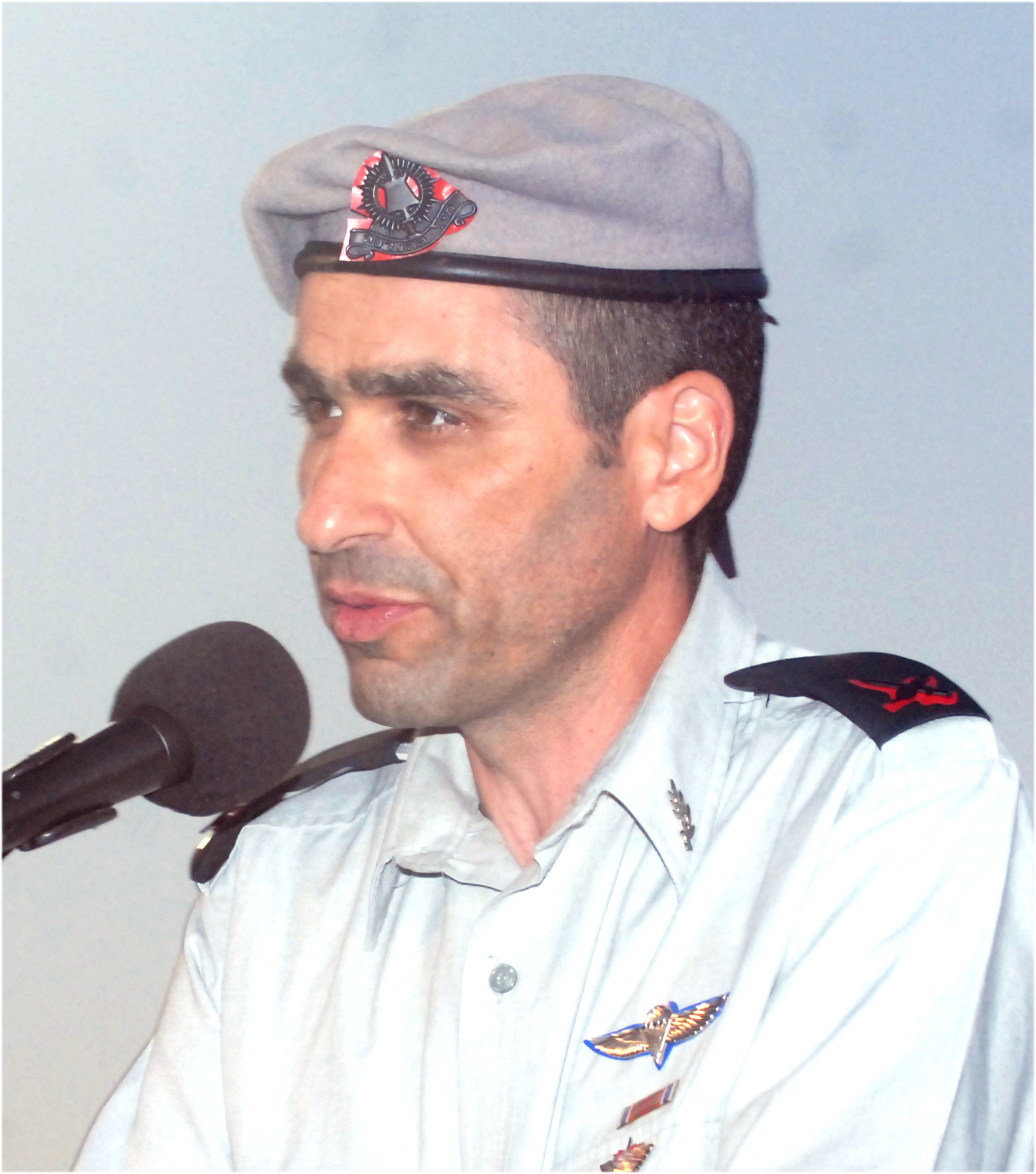 תת אלוף אושרי לוגסי הקהנ"ר החל מהיום 1/10/2014